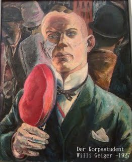 Ein Pfälzer Fuchs. Gemalt von Willi Geiger 1927. Zu sehen im Lenbachhaus, München.